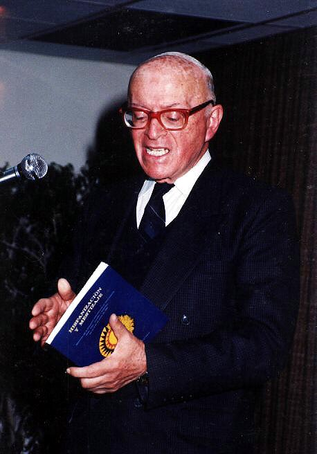 FOTOGRAFÍA DE ALBERTO QUIJANO GUERRRO